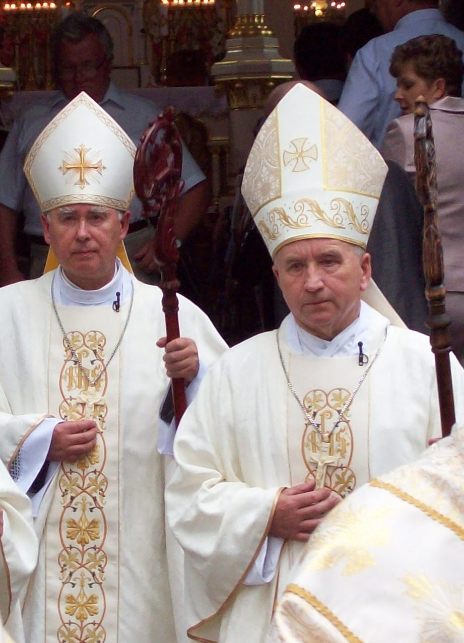 Bp.Maria Ludwik Jabłoński i bp.Maria Bernard Kubicki, przed katedrą mariawicką w Płocku.